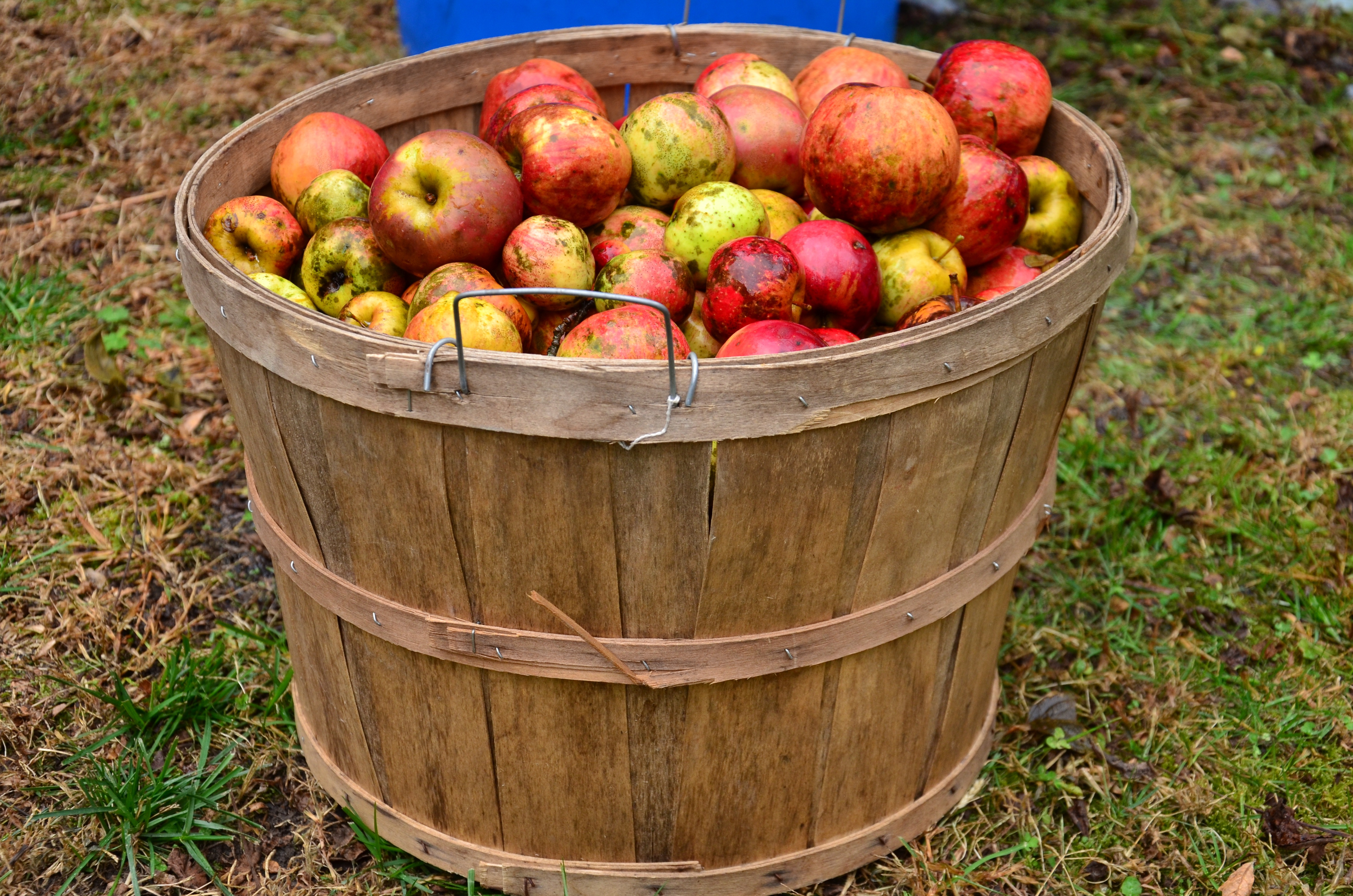 Manzanas para sidra